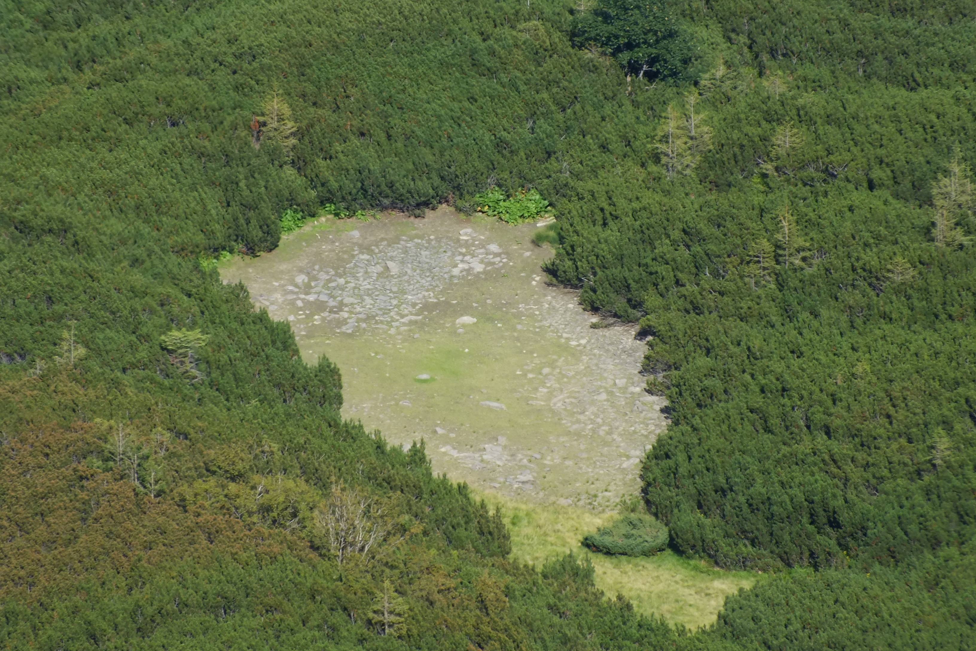 Озерце Туманне, мілке, з кам'янистим, замуленим дном.